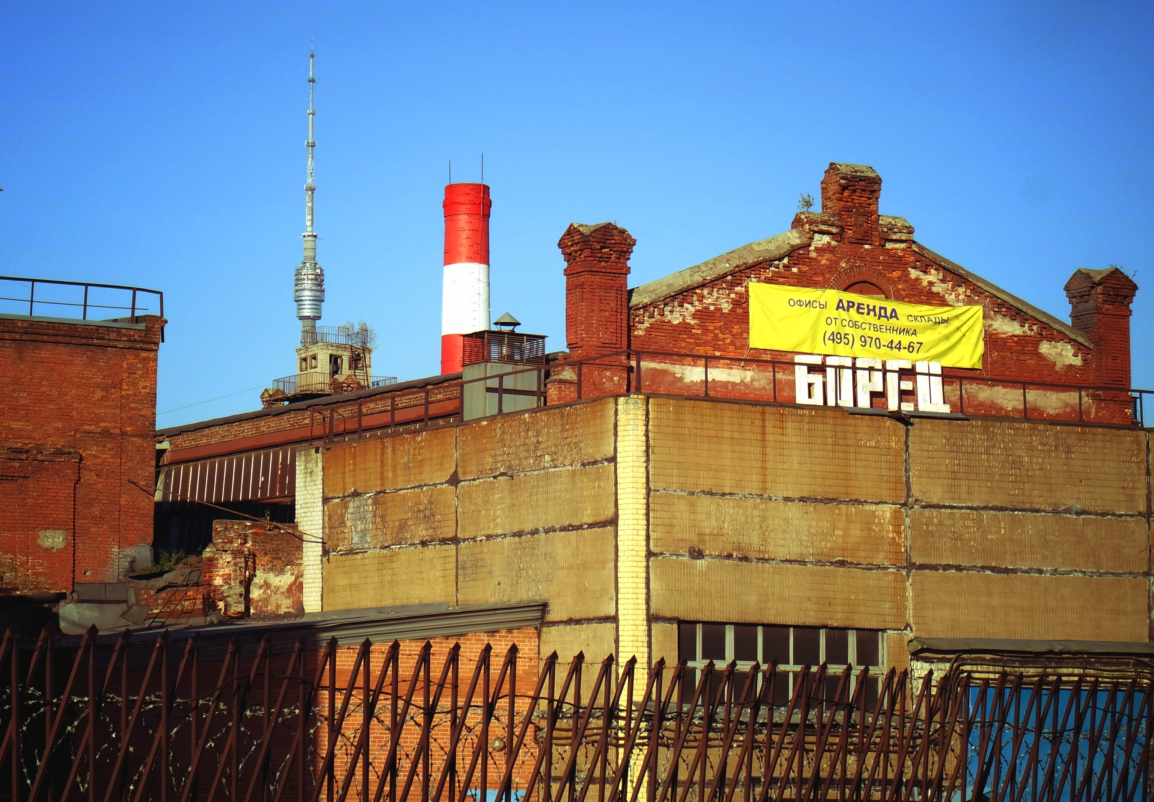 Корпуса бывшего компрессорного завода «Борец» в 2015 году